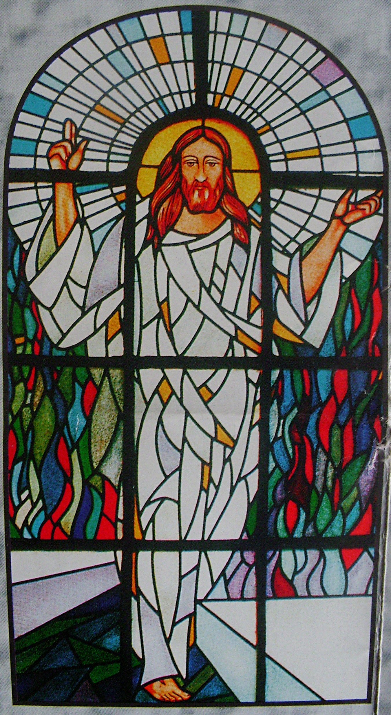 Zmartwychwstanie - witraż w kościele Imienia Maryi w Bączalu Dolnym (diecezja rzeszowska)